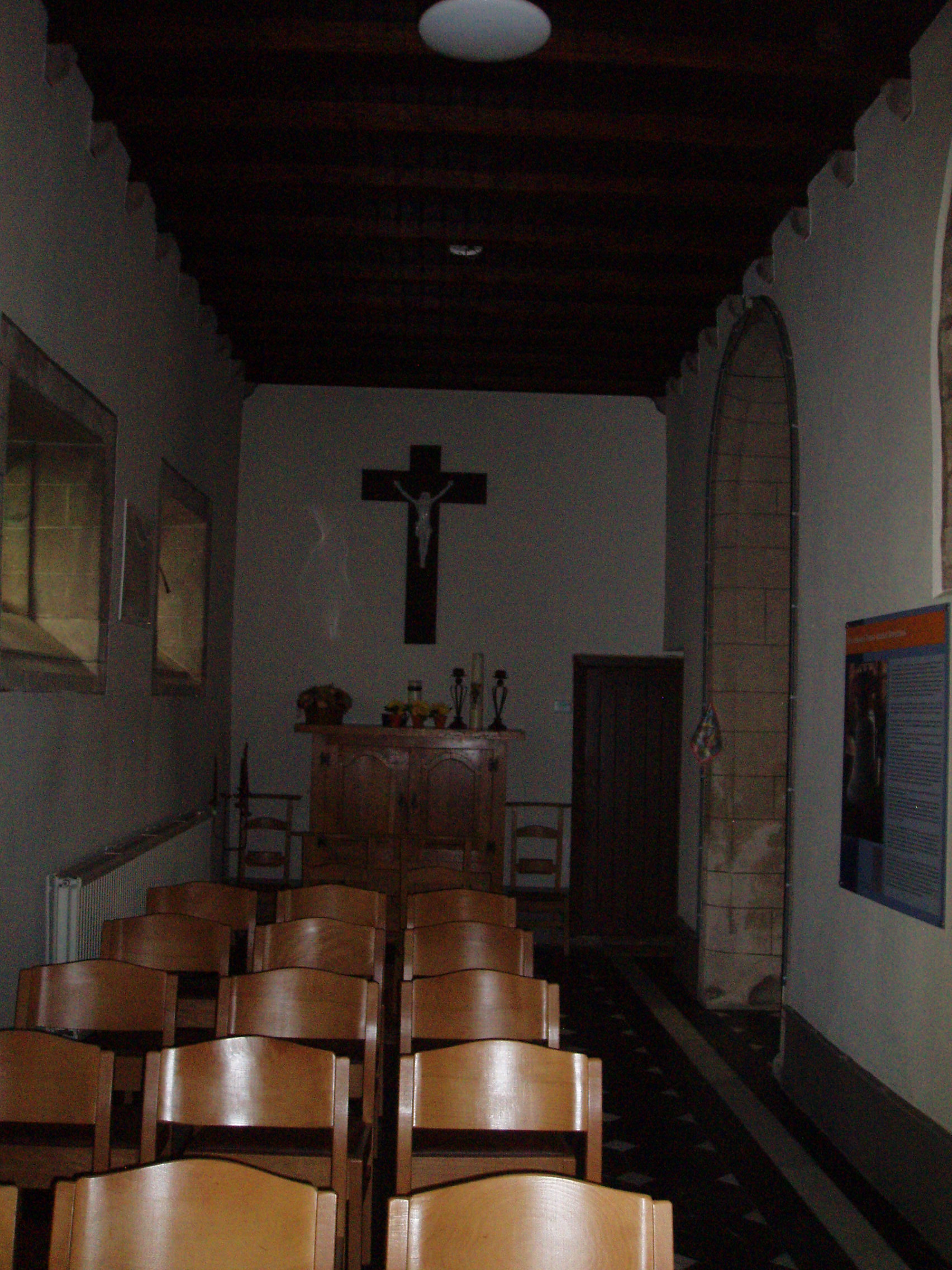 Onze-Lieve-Vrouw ten Steenkapel